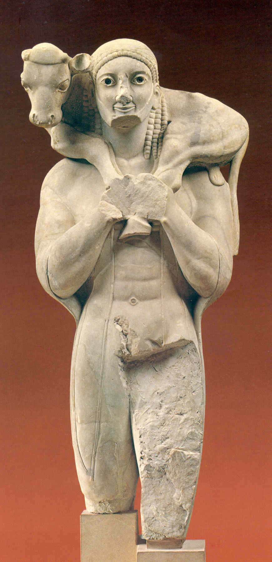 Statua del Moscoforo (Museo dell'Acropoli di Atene)